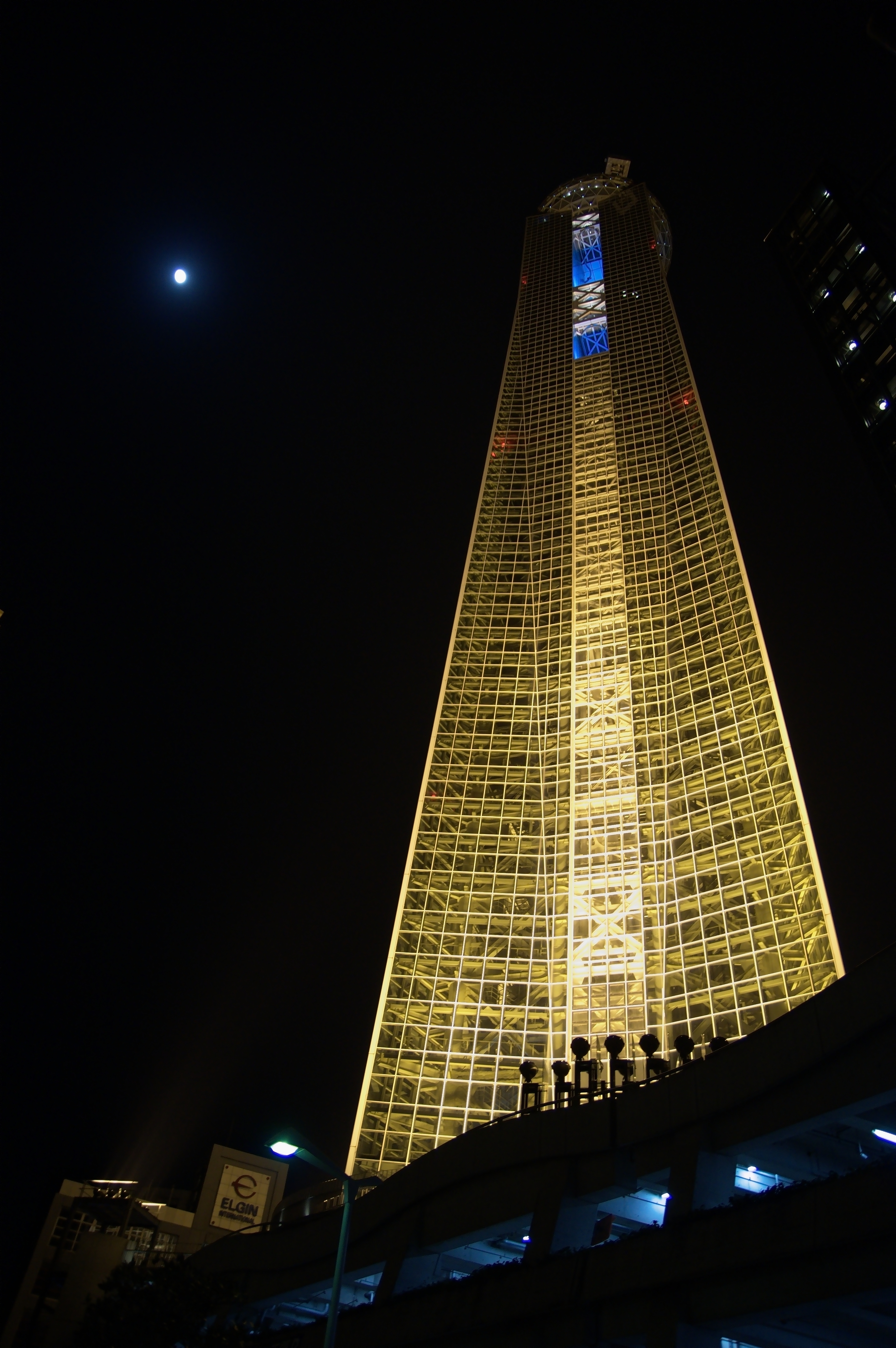 山口県国際総合センター海峡ゆめタワー